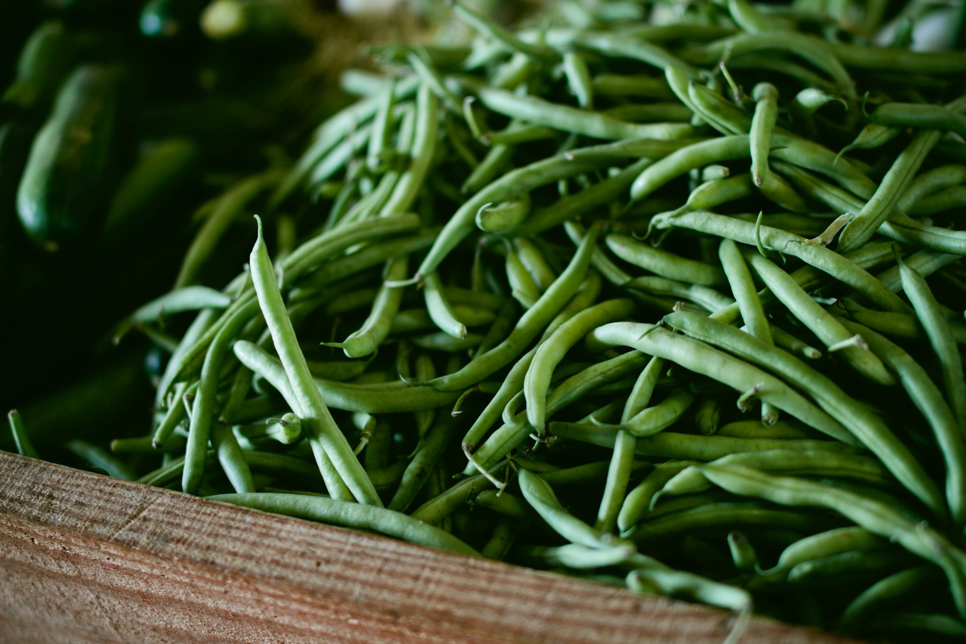 Green beans in a wooden box